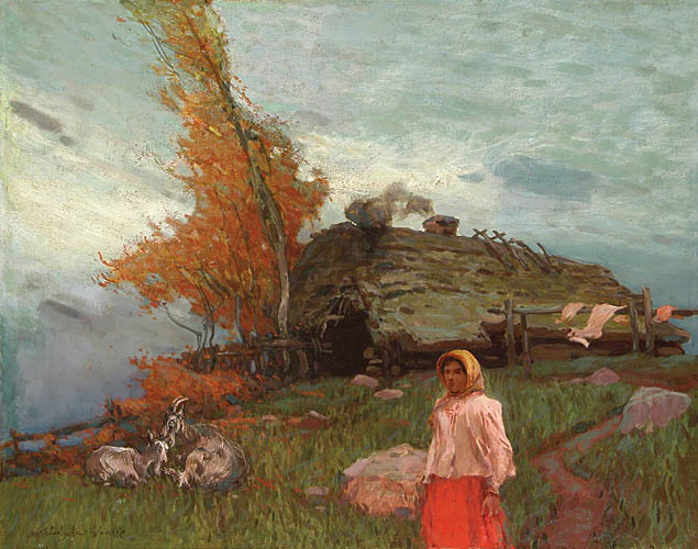 W górach - Olej, płótno; 50 x 62,5 cm